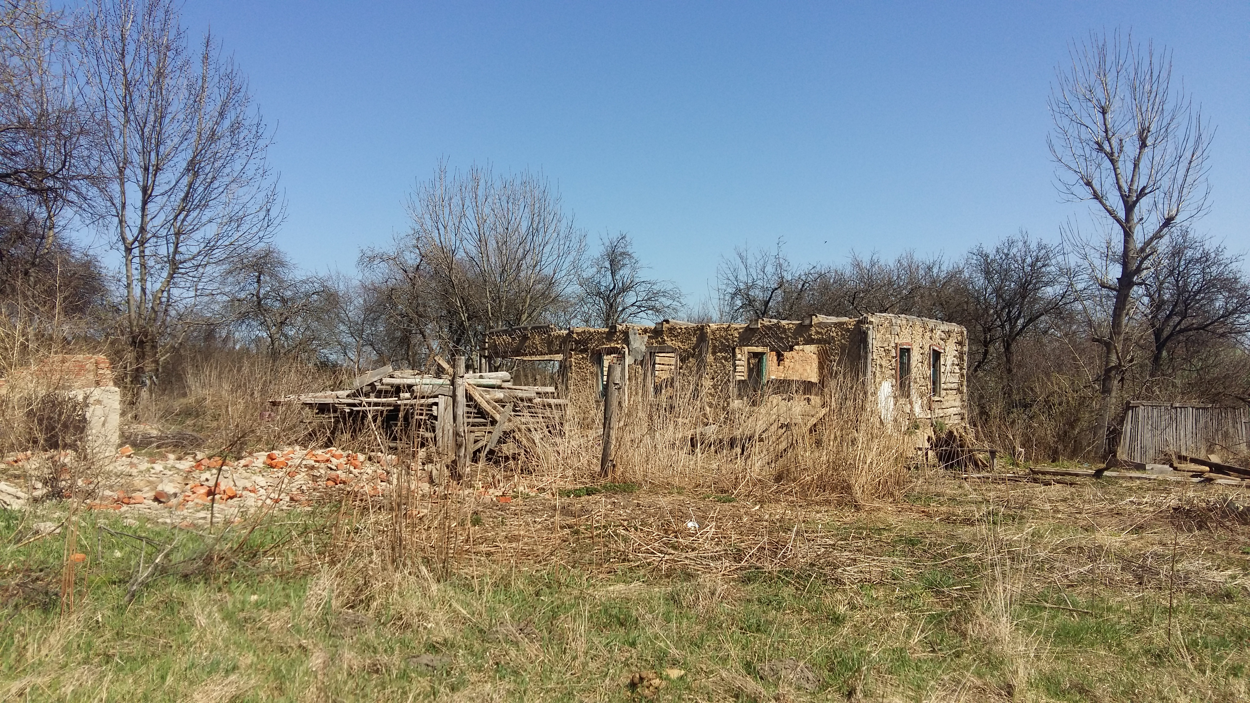 Украина 2018 (село Викторово)